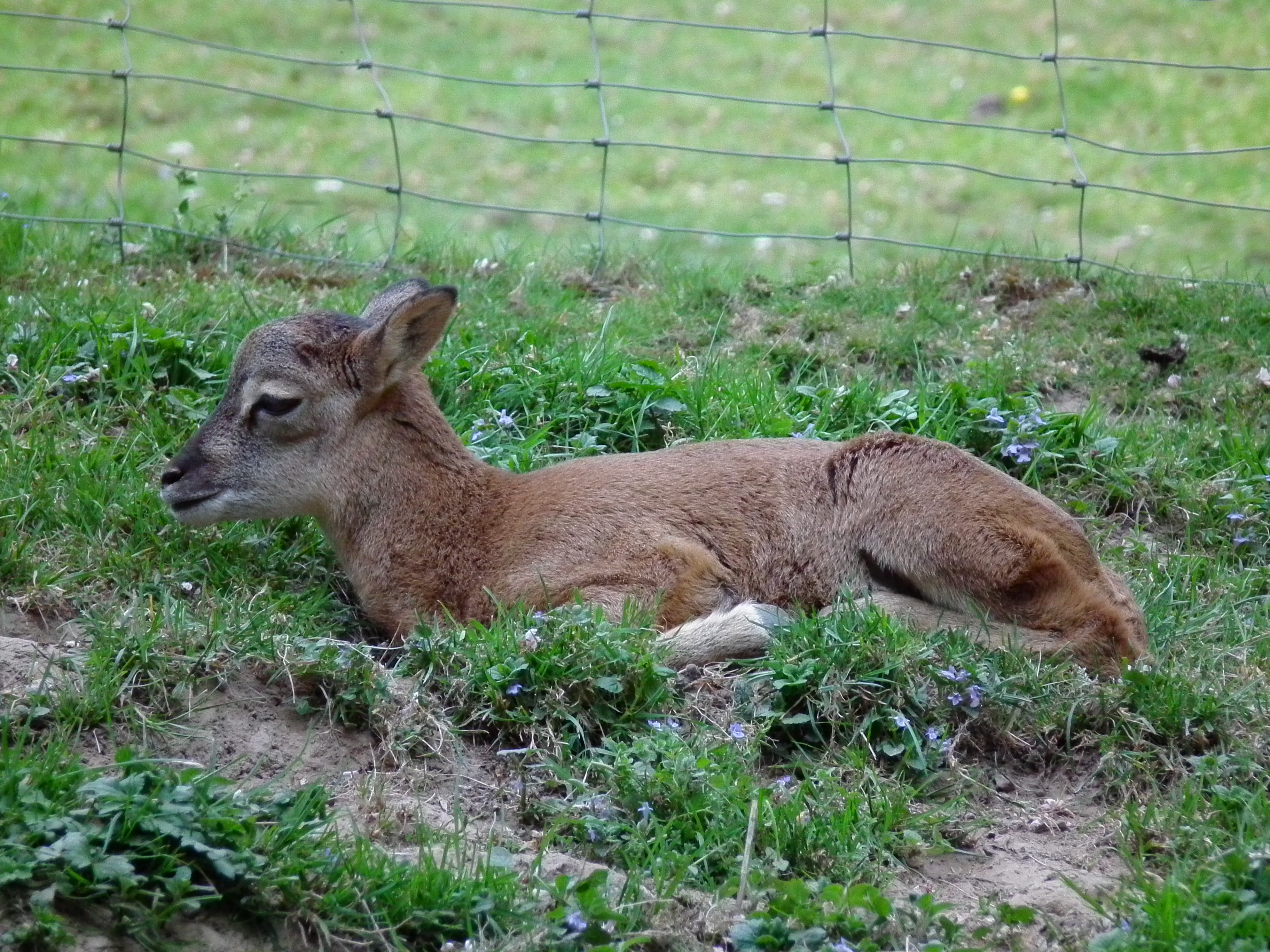 Muffelwild (Ovis ammon musimon) im Bergtierpark Erlenbach (Hessen, Deutschland)